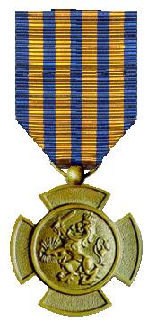 De Bronzen Leeuw is een Nederlandse dapperheidsonderscheiding. Zij is bedoeld voor militairen die voor de Nederlandse Staat strijd geleverd hebben en daarbij bijzonder moedige en beleidvolle daden bedreven hebben.. Eigen scan van een kruis in mijn verzameling